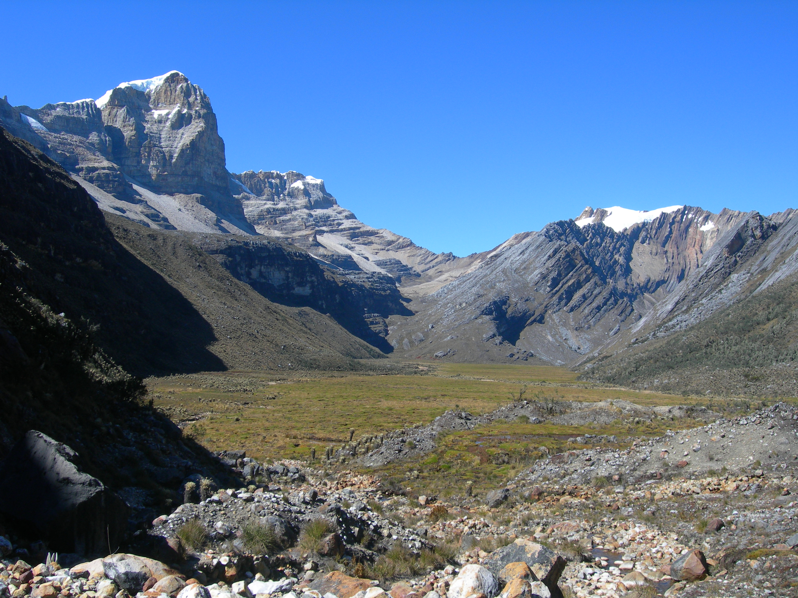 valle de los cojines, parque nacional el cocuy, boyaca, colombia